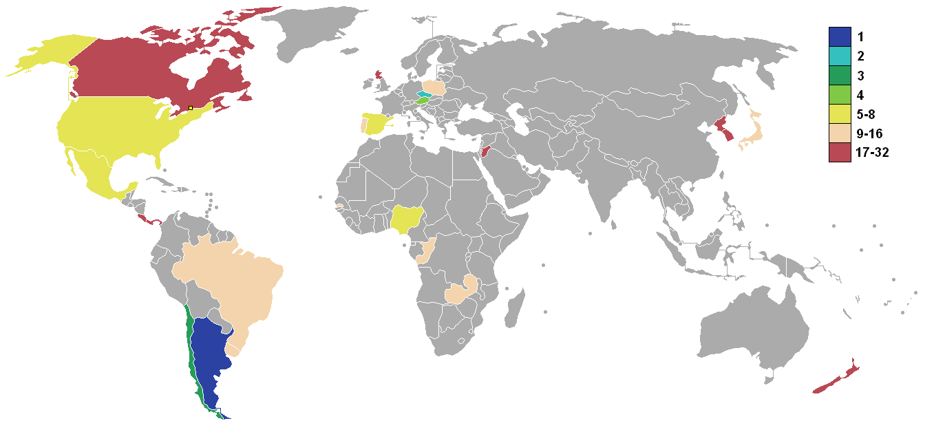 Copa disputada en Canadá